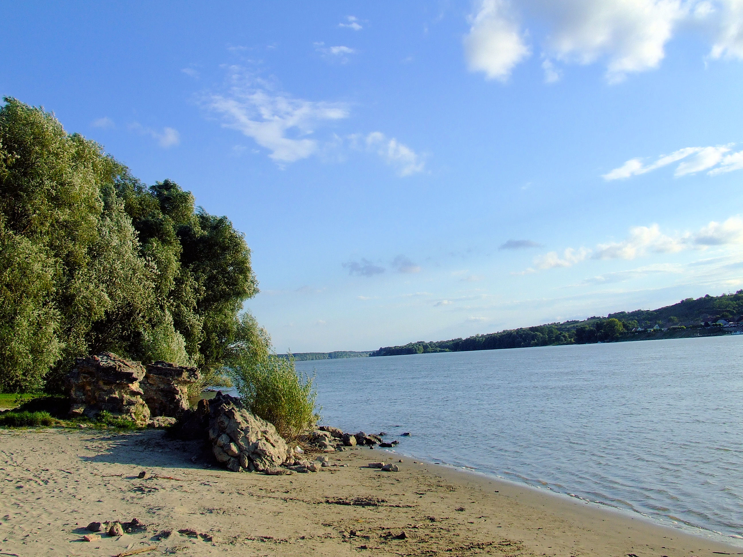 A 370-es évek első felében épült Contra Florentiam kikötőerőd maradványai Dunafalván